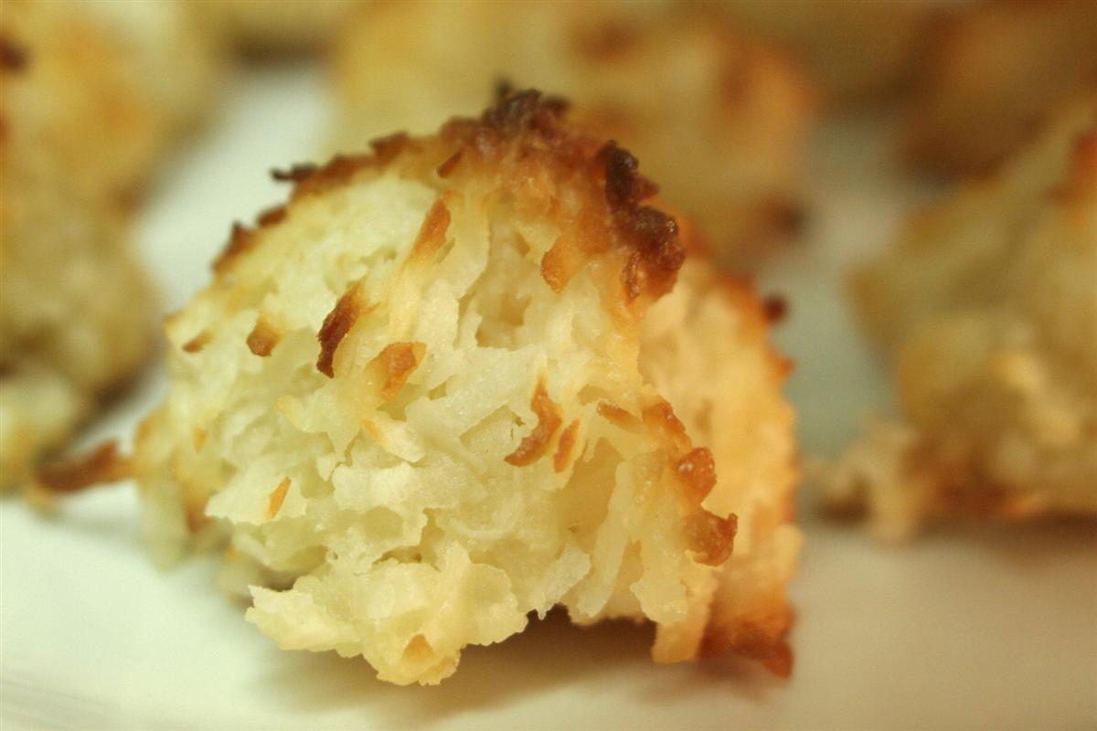 Macaroons in detail.